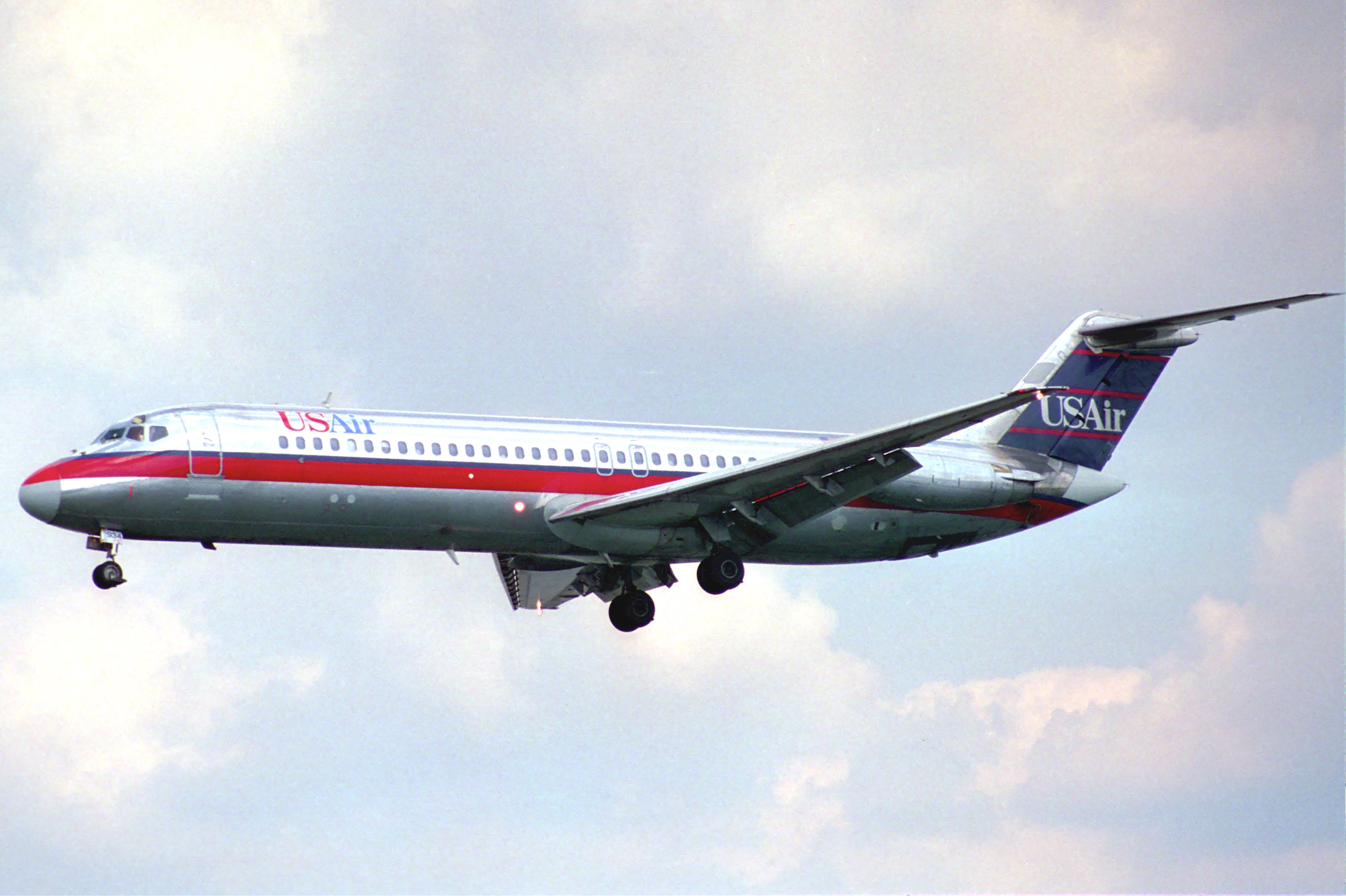 USAir DC-9-31; @DCA;19.07.1995